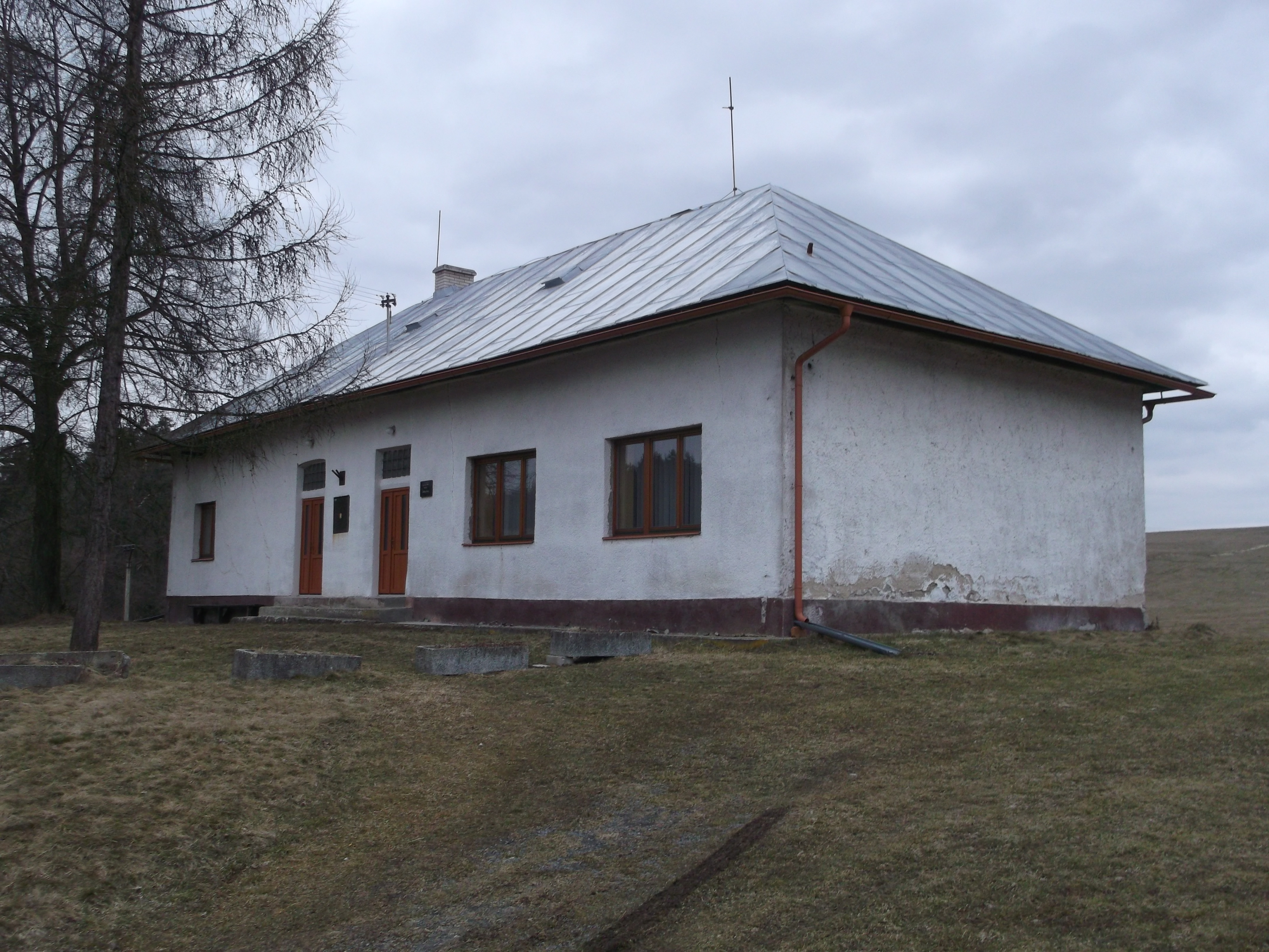 Evanjelicka modlitebna